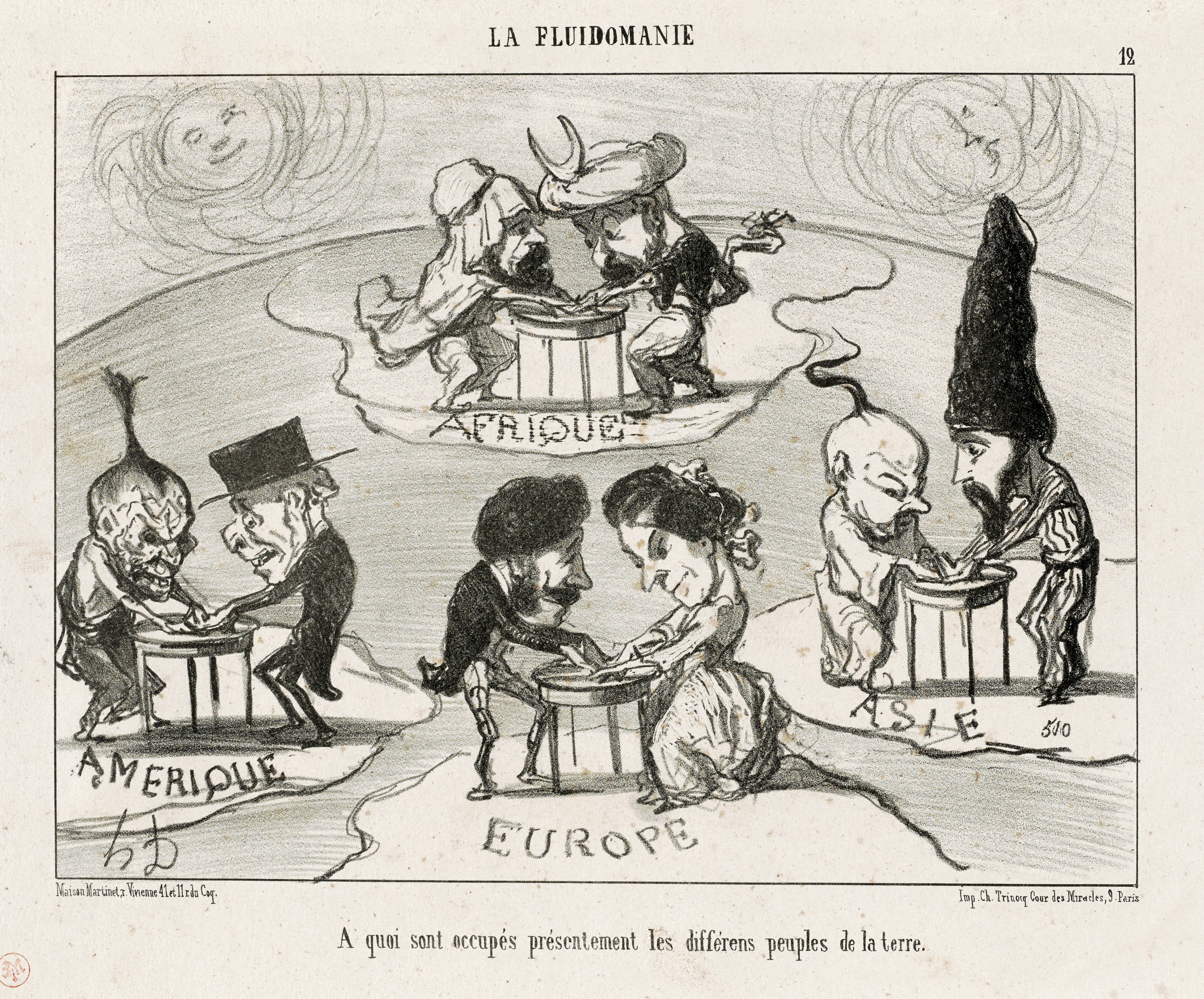 Caricature